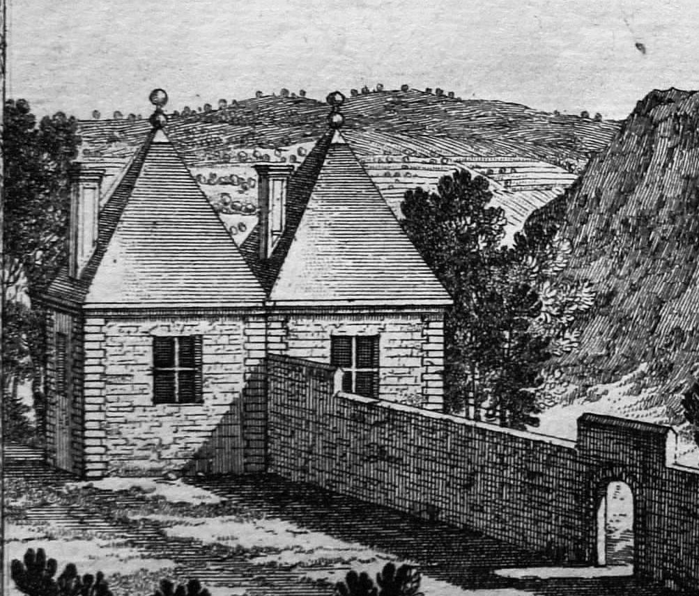 Zamek w Pińczowie w 1657 roku - pawilon ogrodowy